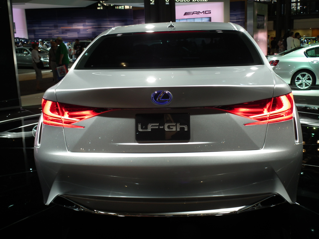 Lexus LF-Gh